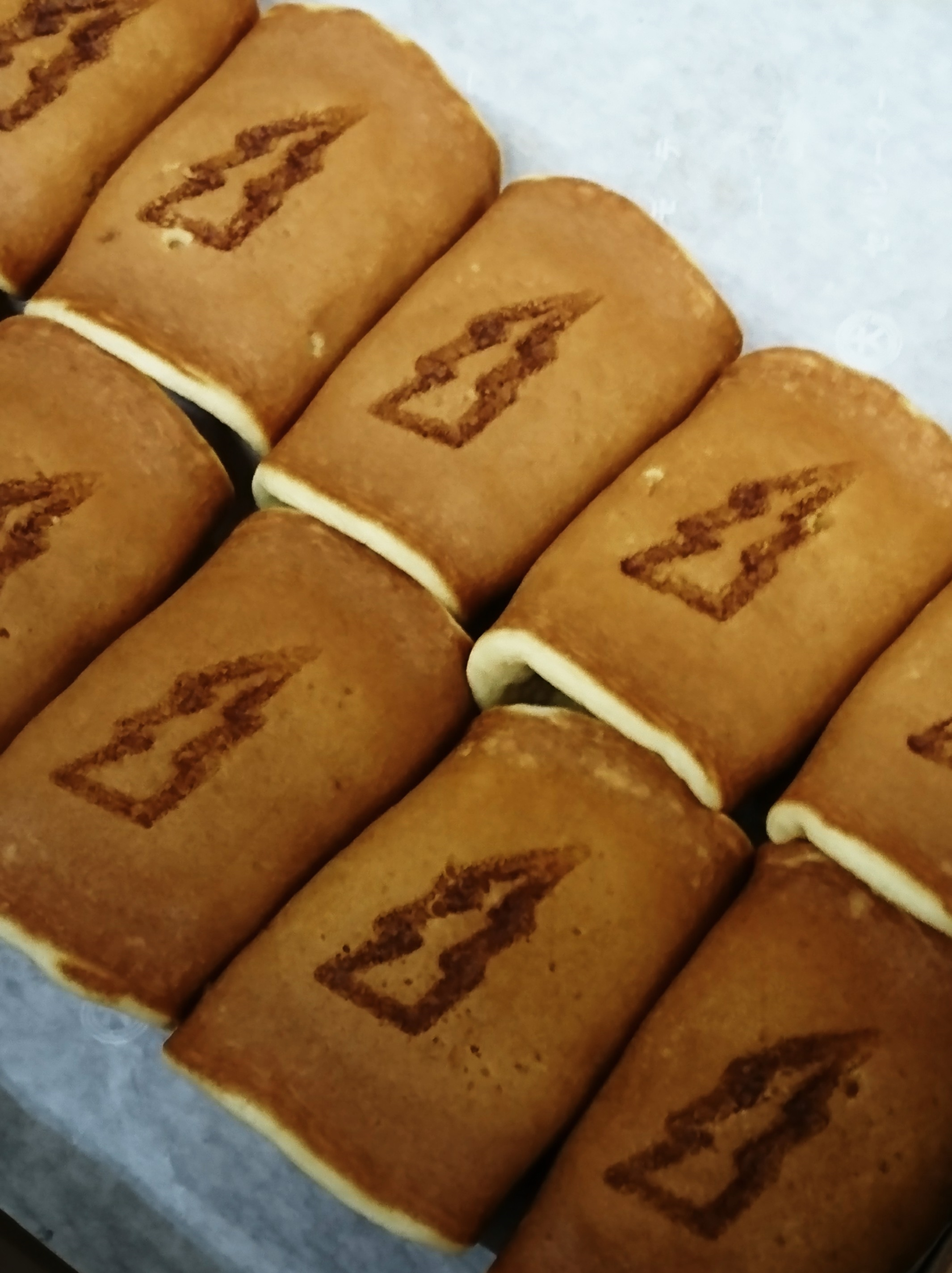 ブラックサンダーあん巻き